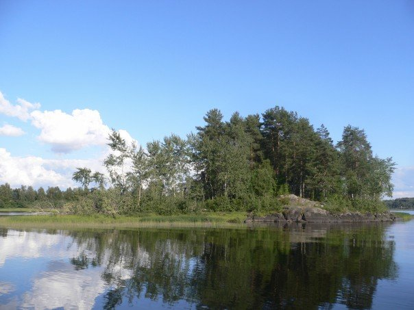 Svennebyholmen, Storsjøen, Hedmark